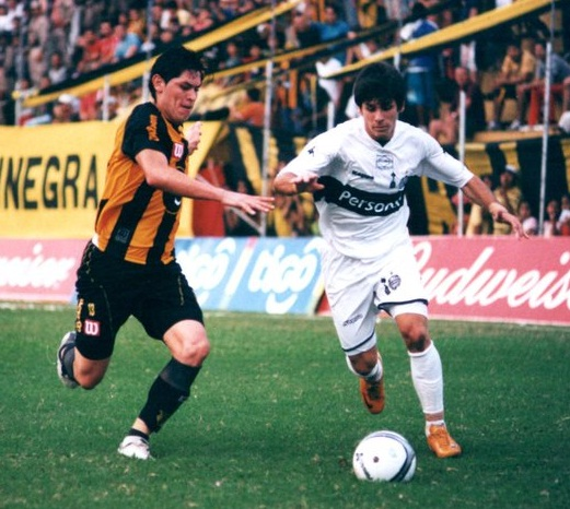 Paulo Centurión en el juego Club Guaraní vs Club Olimpia que termino en victoria para el aborigen por 2-0, en la imagen disputando el balón con Ricardo Domínguez